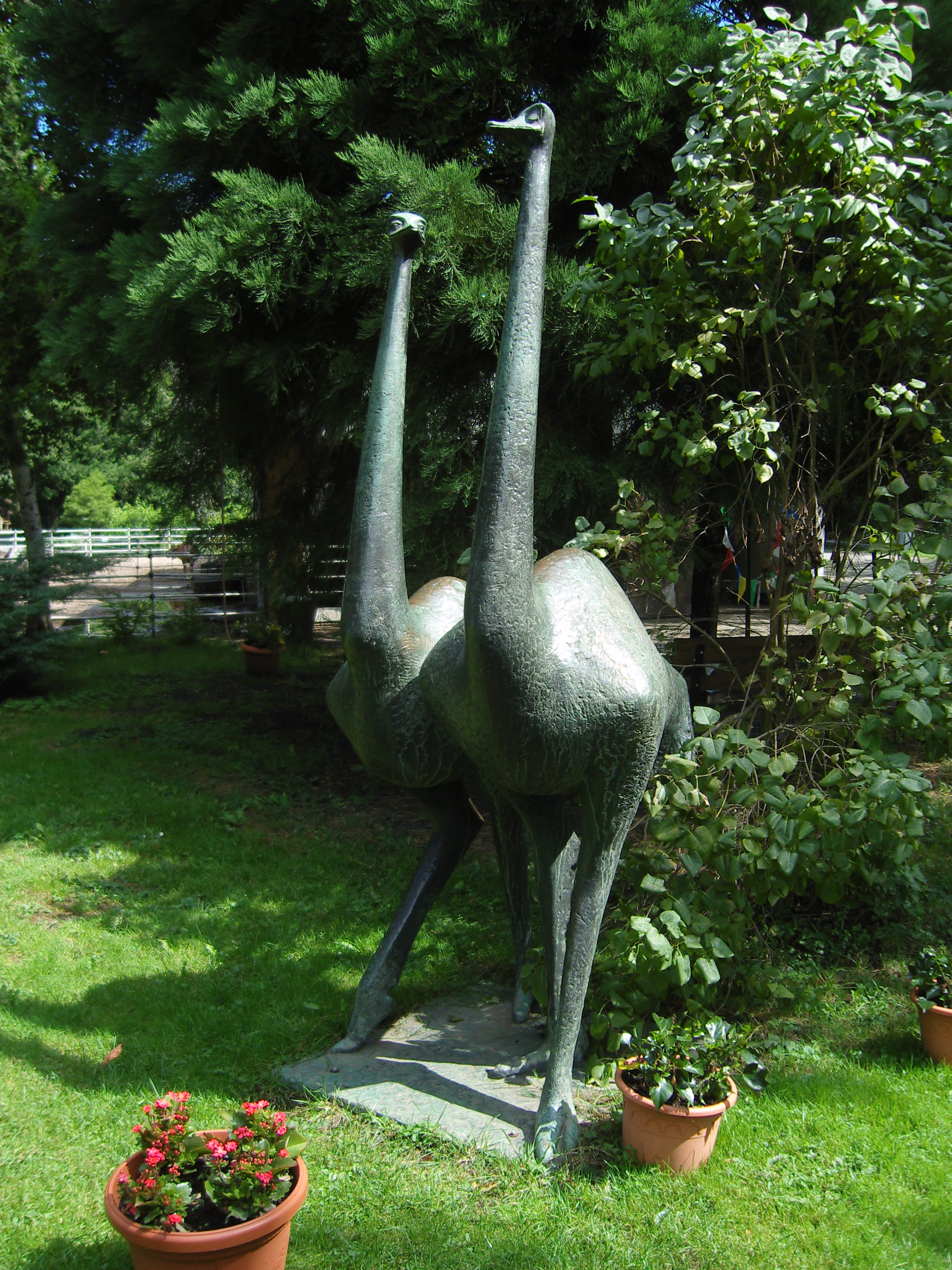 Zwei Straußenplastiken von Ernst Sauer in Senftenberg, ursprünglich standen sie von der damaligen Schule POS V "Otto Grothewohl", nach deren Rückbau wurden sie im Tierpark aufgestellt